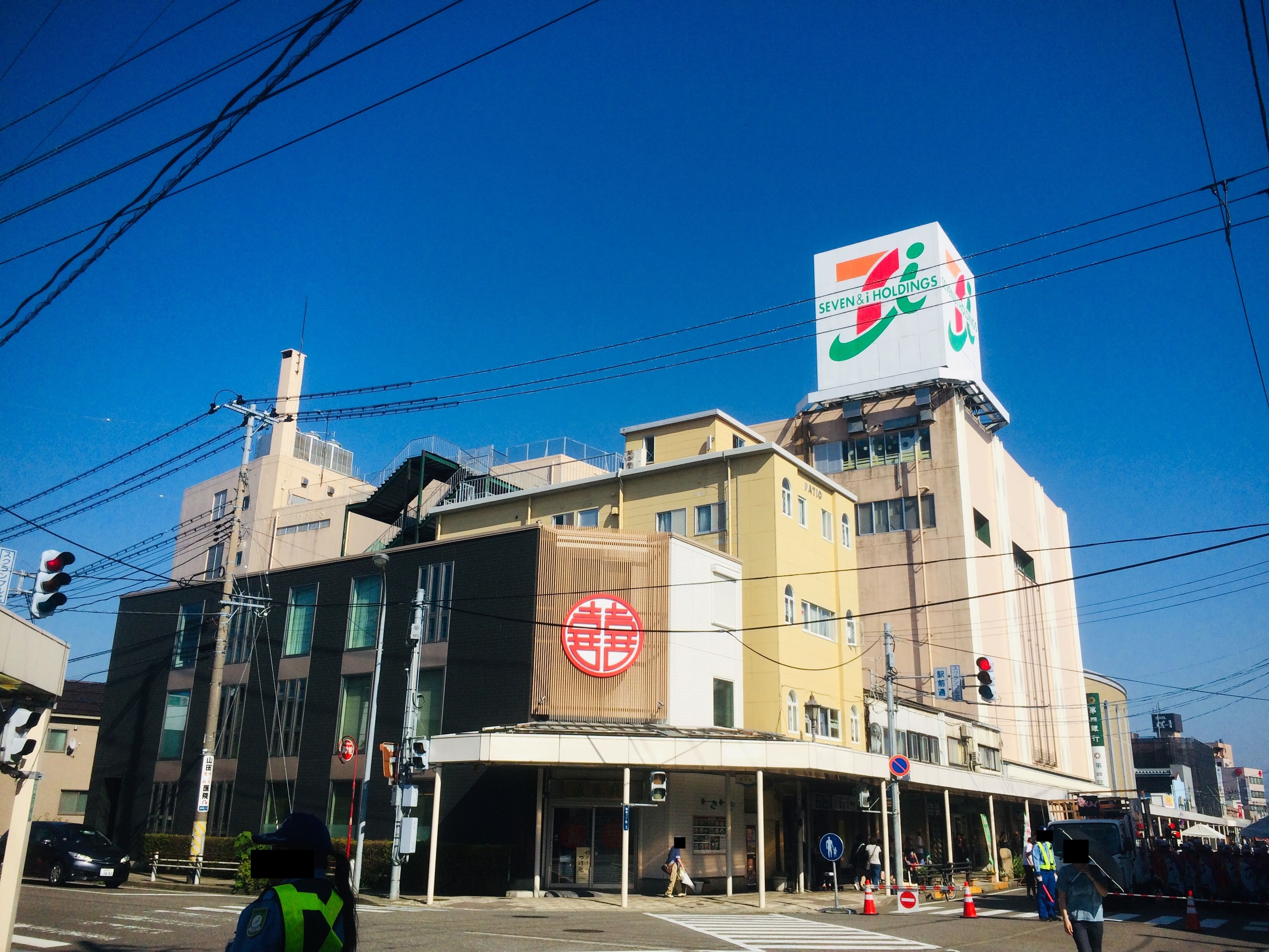 イトーヨーカドー丸大柏崎店